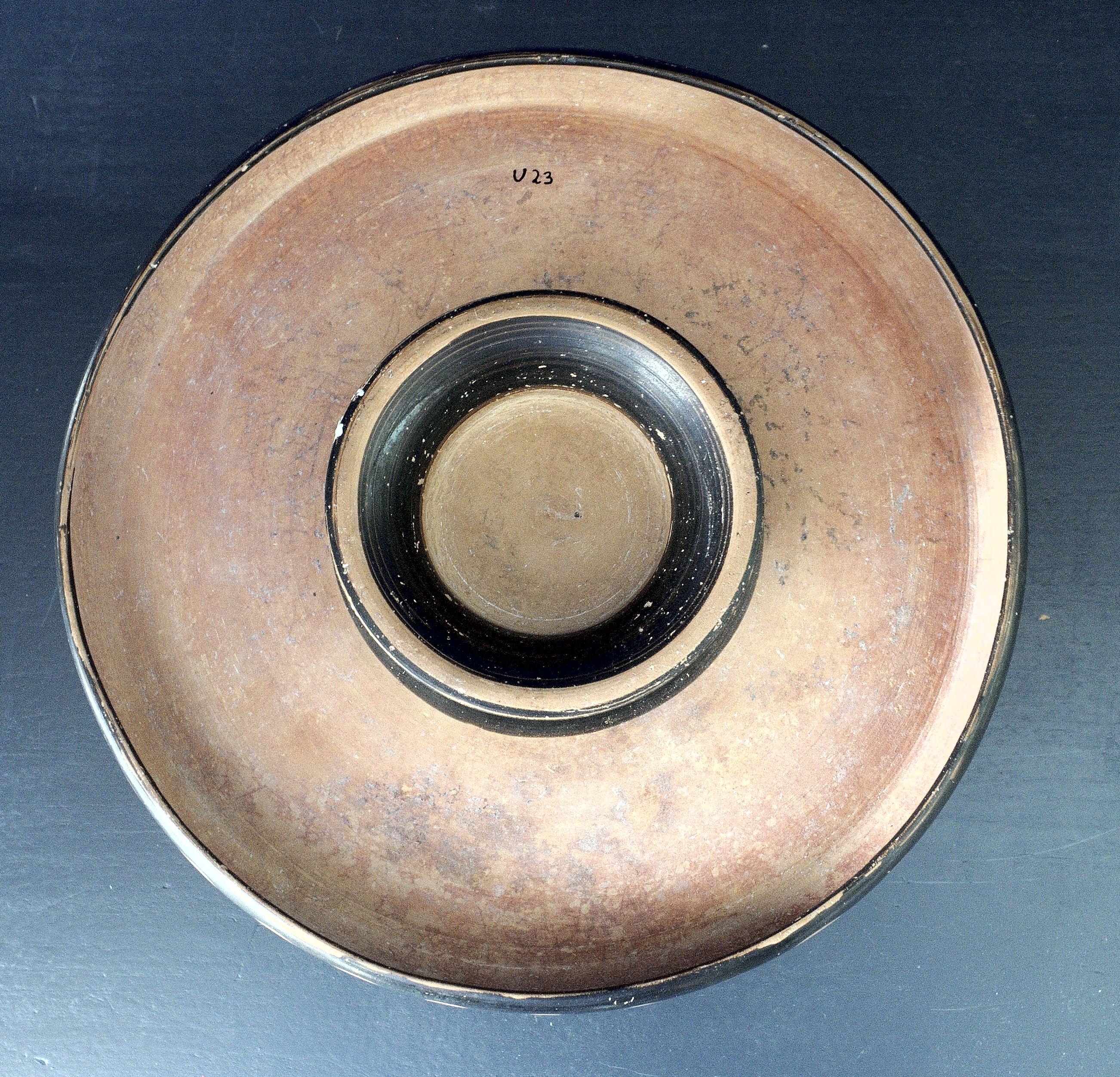 Objekt im Antikenmuseum der Universität Heidelberg. Apulischer Fischteller (Heidelberg U 23)